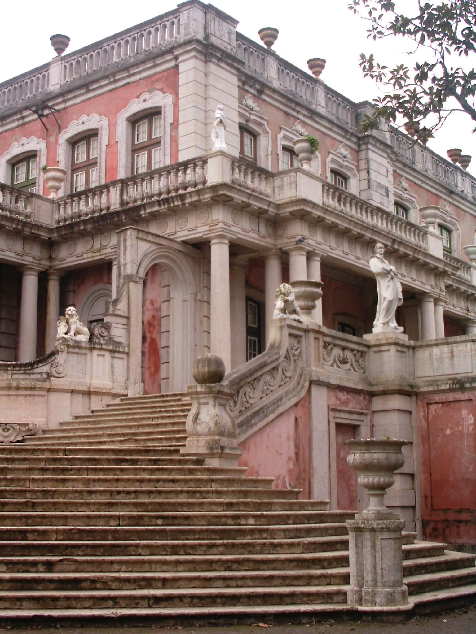 Palácio de Queluz, Portugal. Vista para o Pavilhão Robillion.